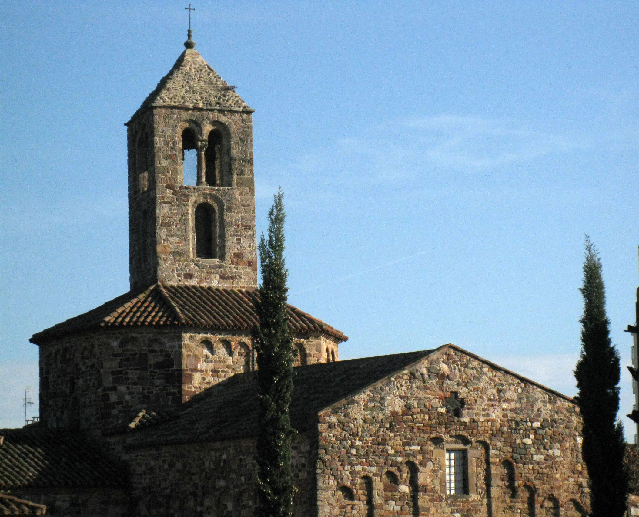 Església de Santa Maria, dins el conjunt monumental de les esglésies de Sant Pere (Terrassa).